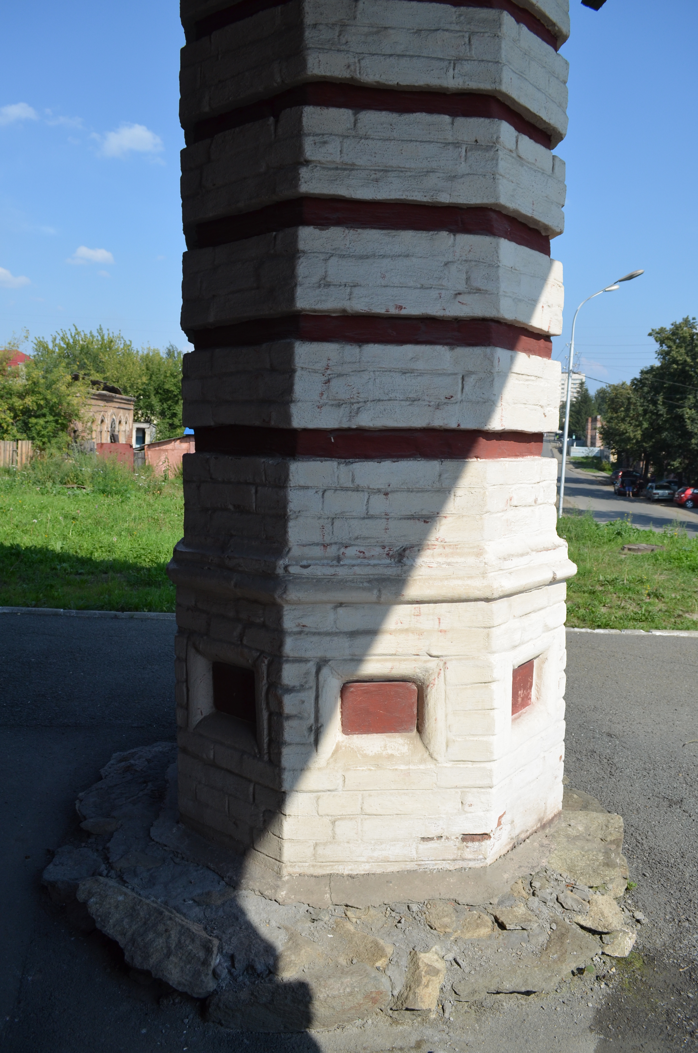 Верхний провиантский склад (Свердловская область, Нижний Тагил, улица Уральская, 1а/1)